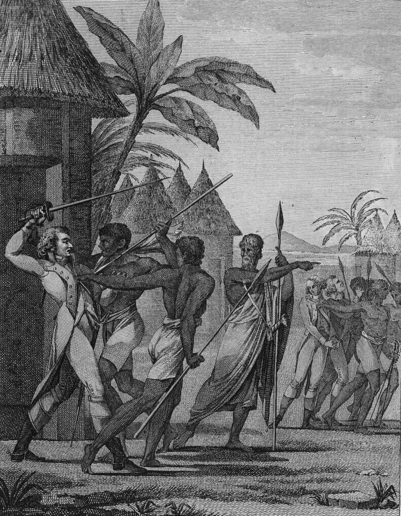 Arrestation d'André Brue par le damel du Cayor (in Atlas pour servir au voyage du Sénégal de Jean-Baptiste Durand)